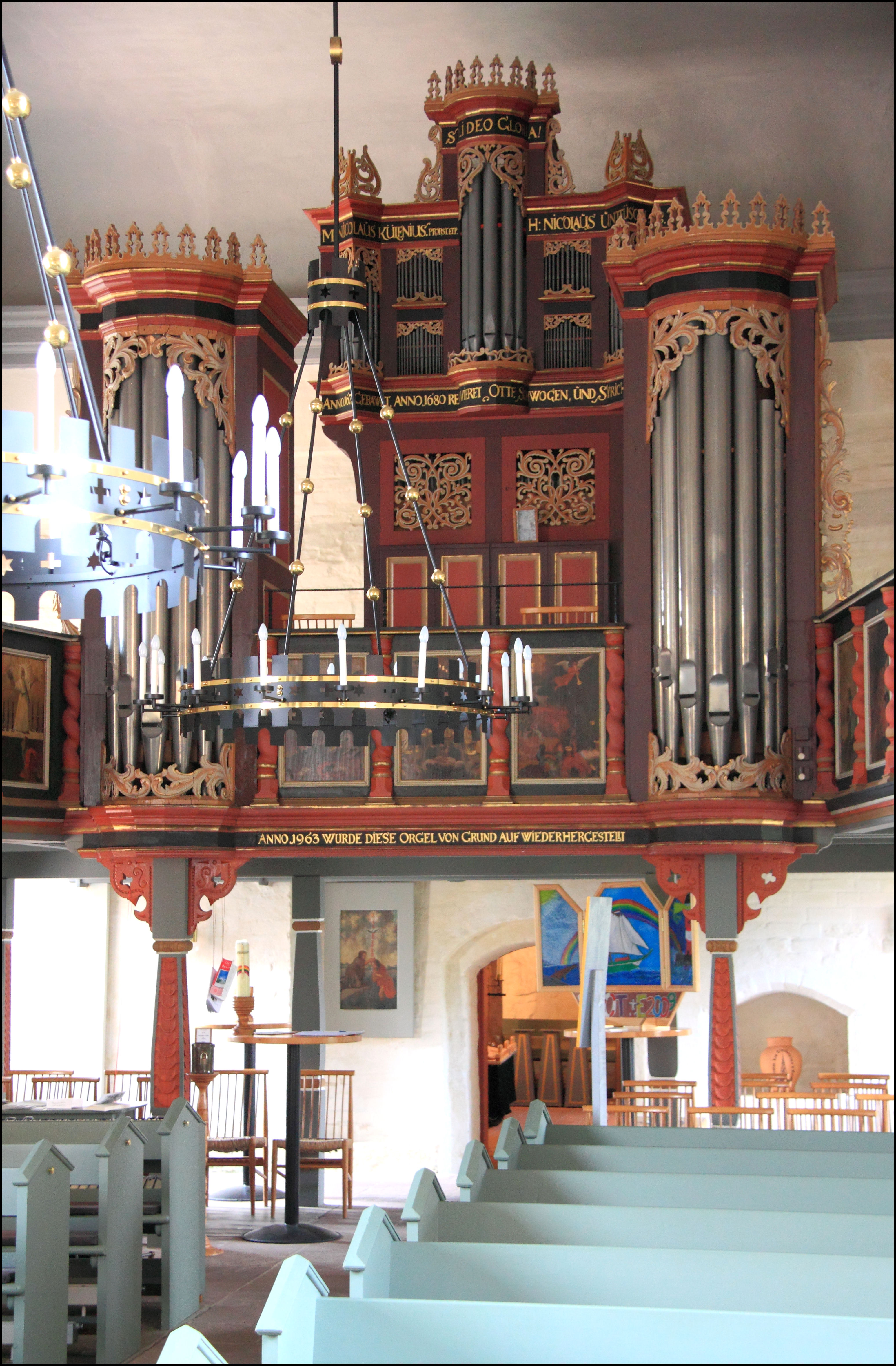 Orgel in Sandstedt, Niedersachsen